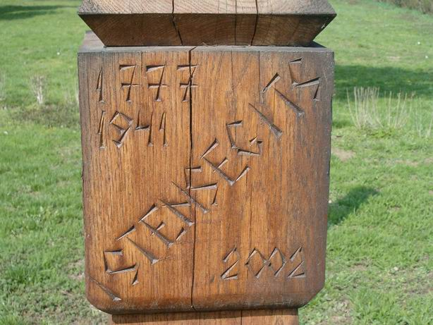 Detail from Kopjafa